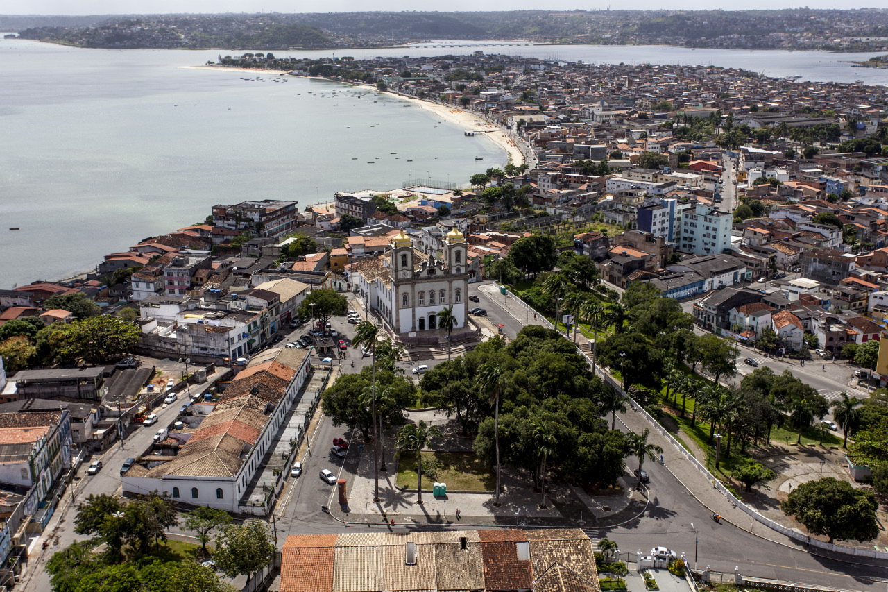 Vista aérea da Igreja de Nosso Senhor do Bonfim, e a ponte ferroviária dos Trens do Subúrbio Ferroviário, em Salvador.